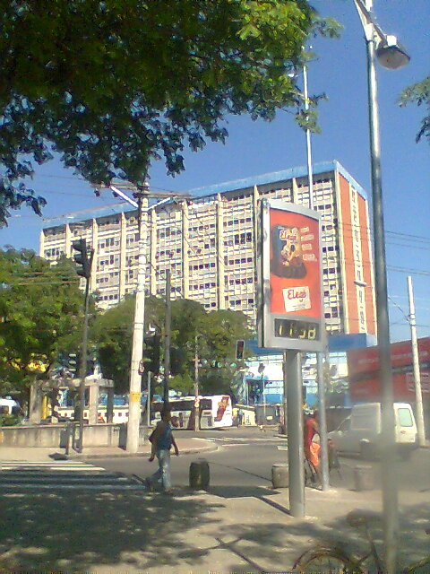 Hospital Dom Pedro II, em Santa Cruz, Rio de janeiro, Brasil.